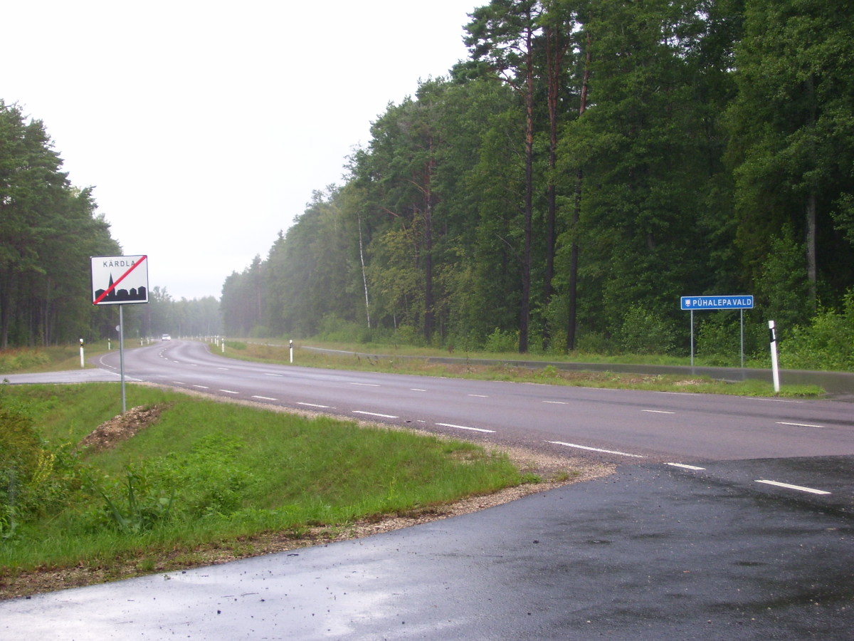 Heltermaa-Kärdla-Luidja maantee Kärdla linna piiril, vaade Kärdla poolt Luidja poole